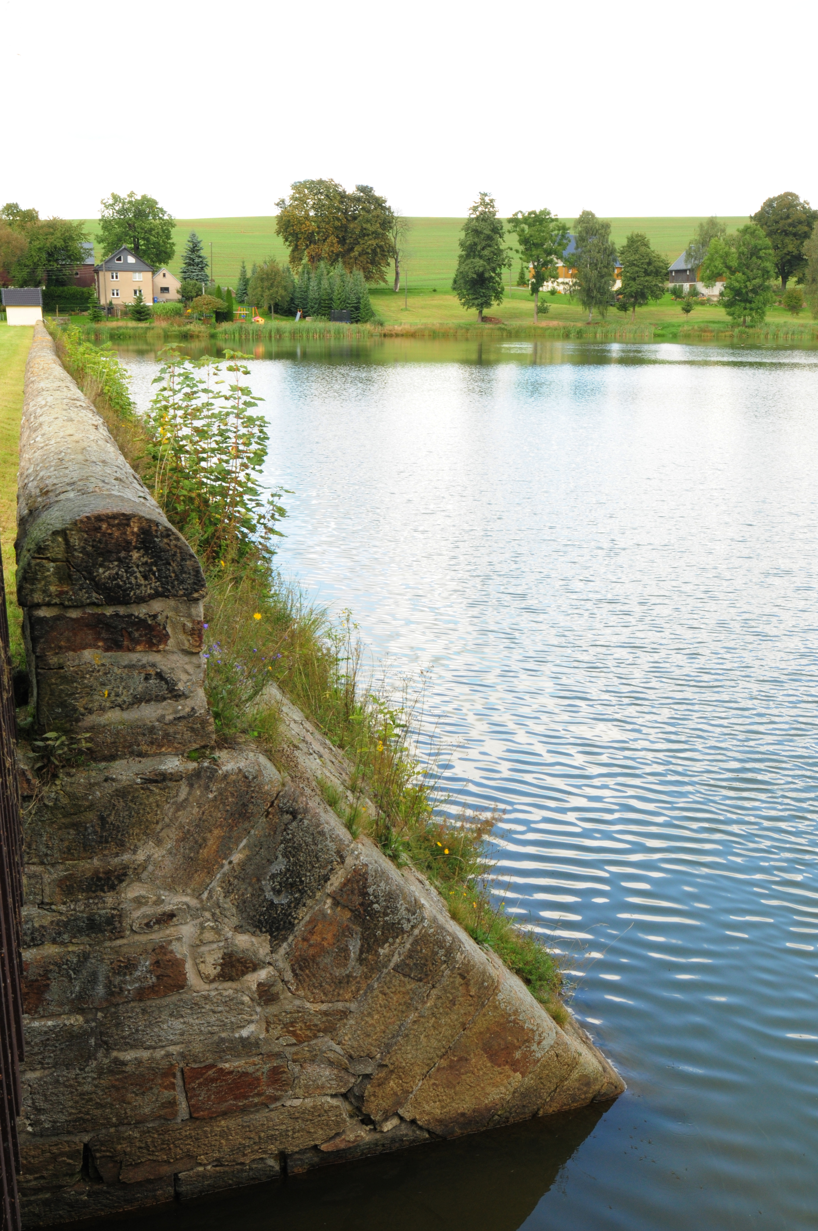 Revierwasserlaufanstalt Freiberg, Obersaidaer Teich in Obersaida, Ausmauerung des Überlaufs (Landkreis Mittelsachsen, Sachsen, Deutschland)